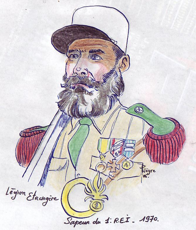 Sapeur de la légion étrangère